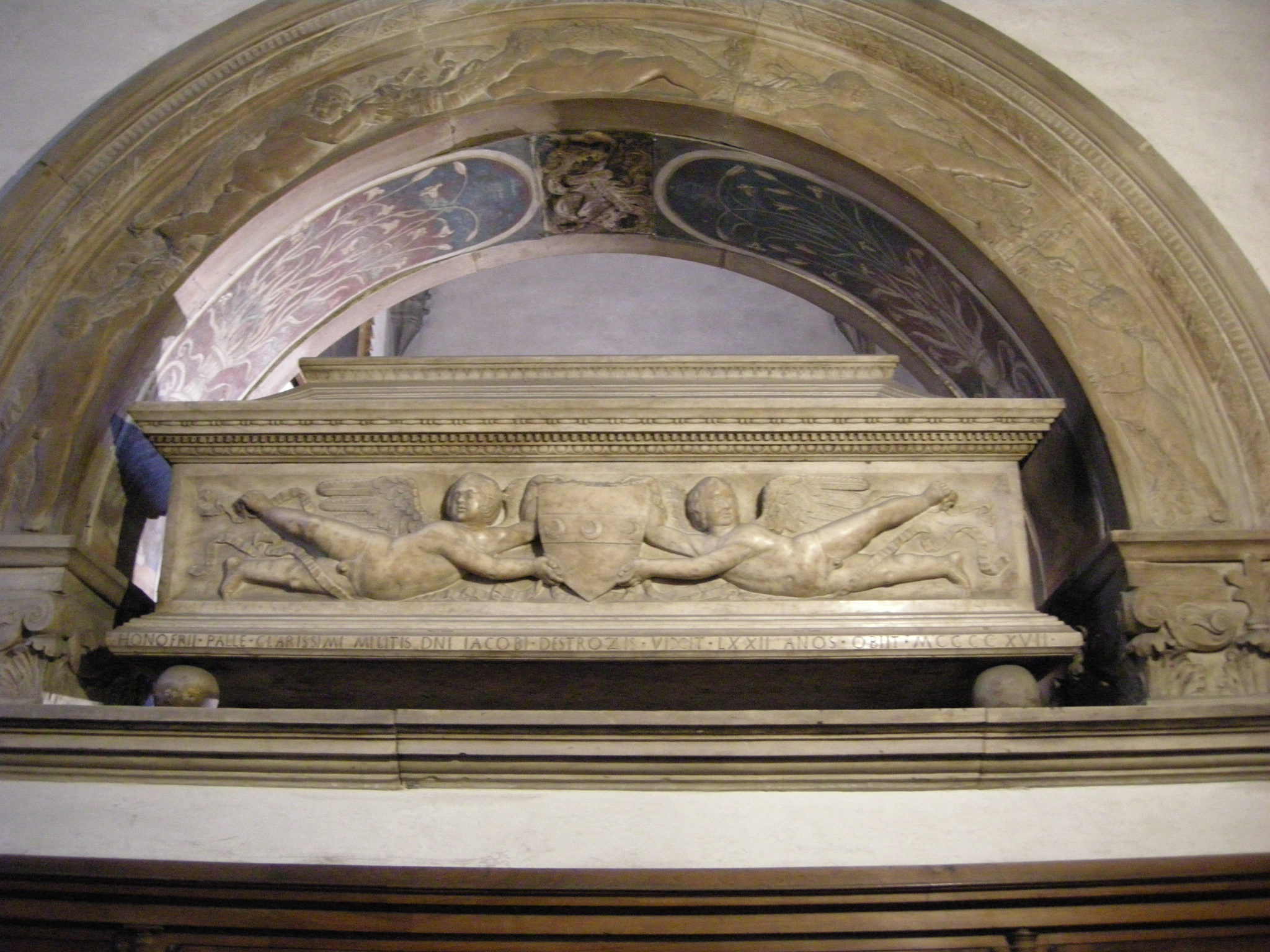 Tomba di onofrio strozzi di pietro limberti